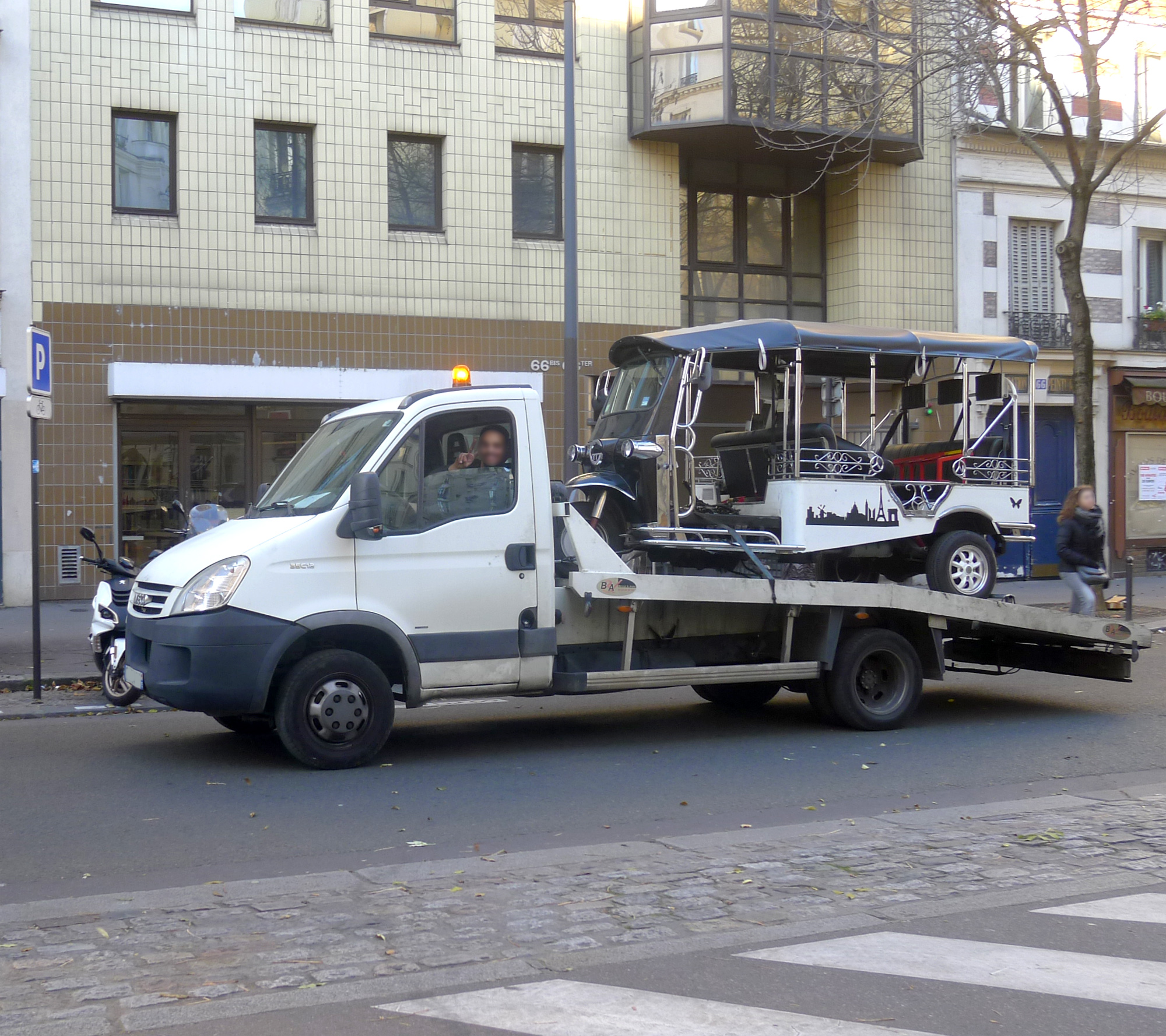 Dépanneuse ou fourrière, avenue Jean-Moulin - Paris XIV